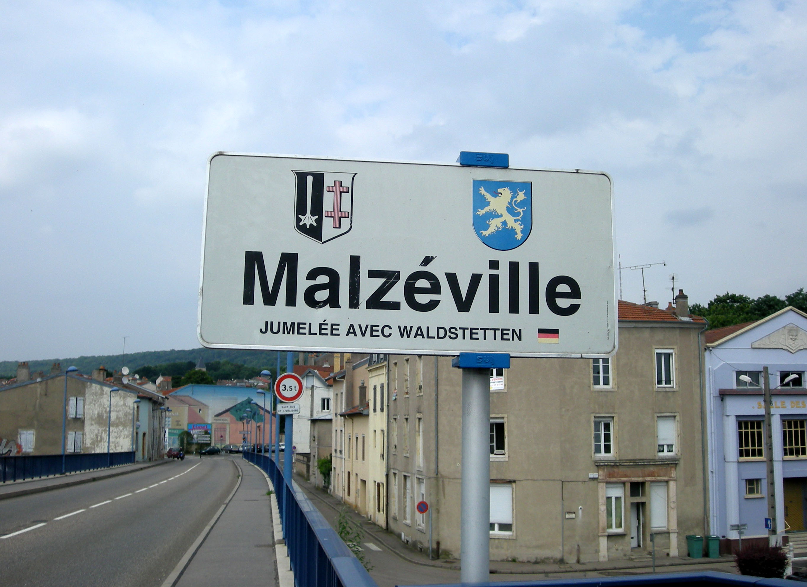 Jumelage de Malzéville (Meurthe-et-Moselle) avec Waldstetten (Allemagne)